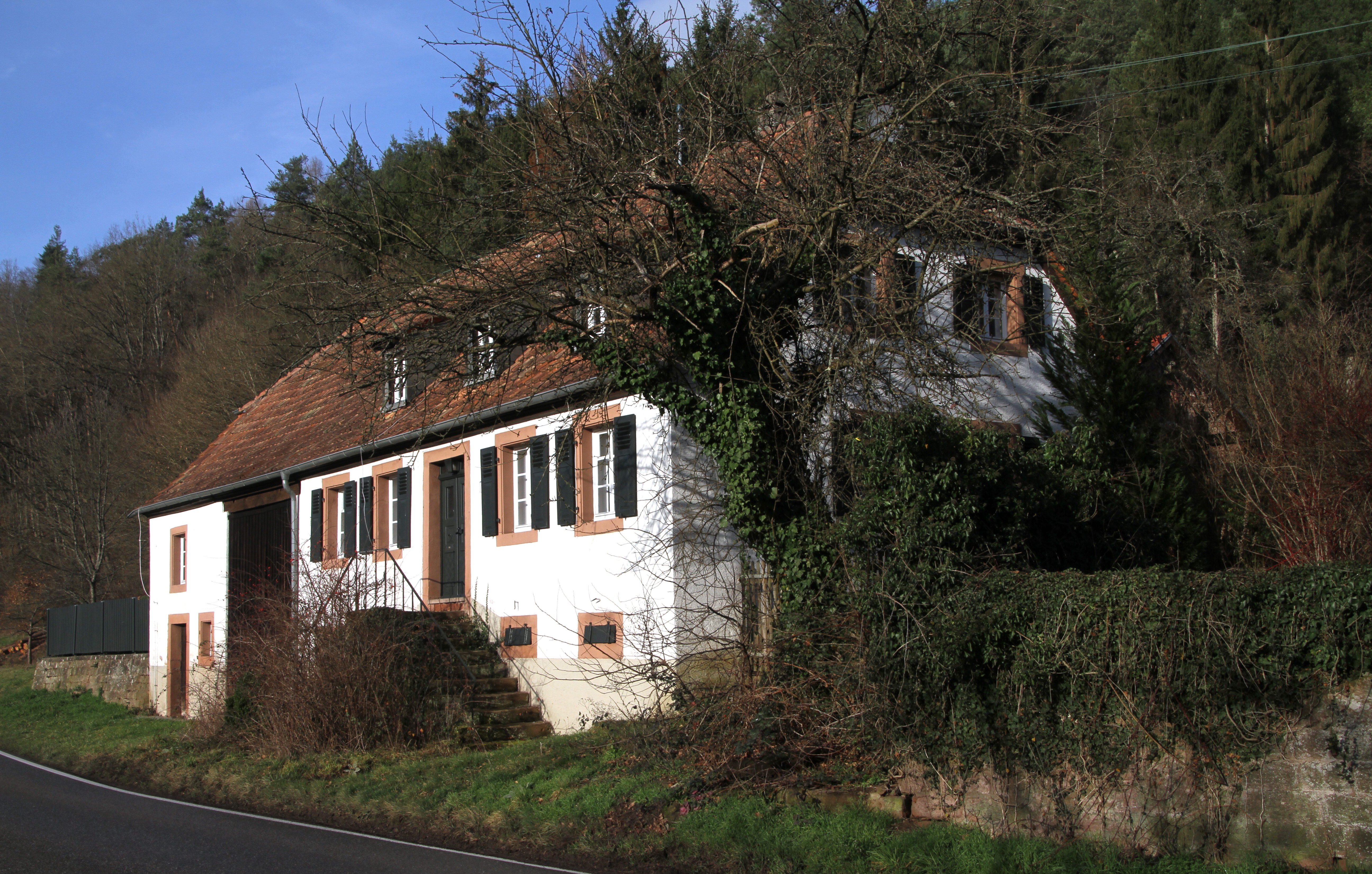 Niederschlettenbach, ehemaliges Forstamt Erzgrube; westlich des Ortes an der L 478; Quereinhaus; Krüppelwalmdachbau, 19. Jahrhundert, rückwärtig Nebengebäude; in der straßenseitigen Gartenstützmauer Stollenmundloch, bezeichnet 1835.